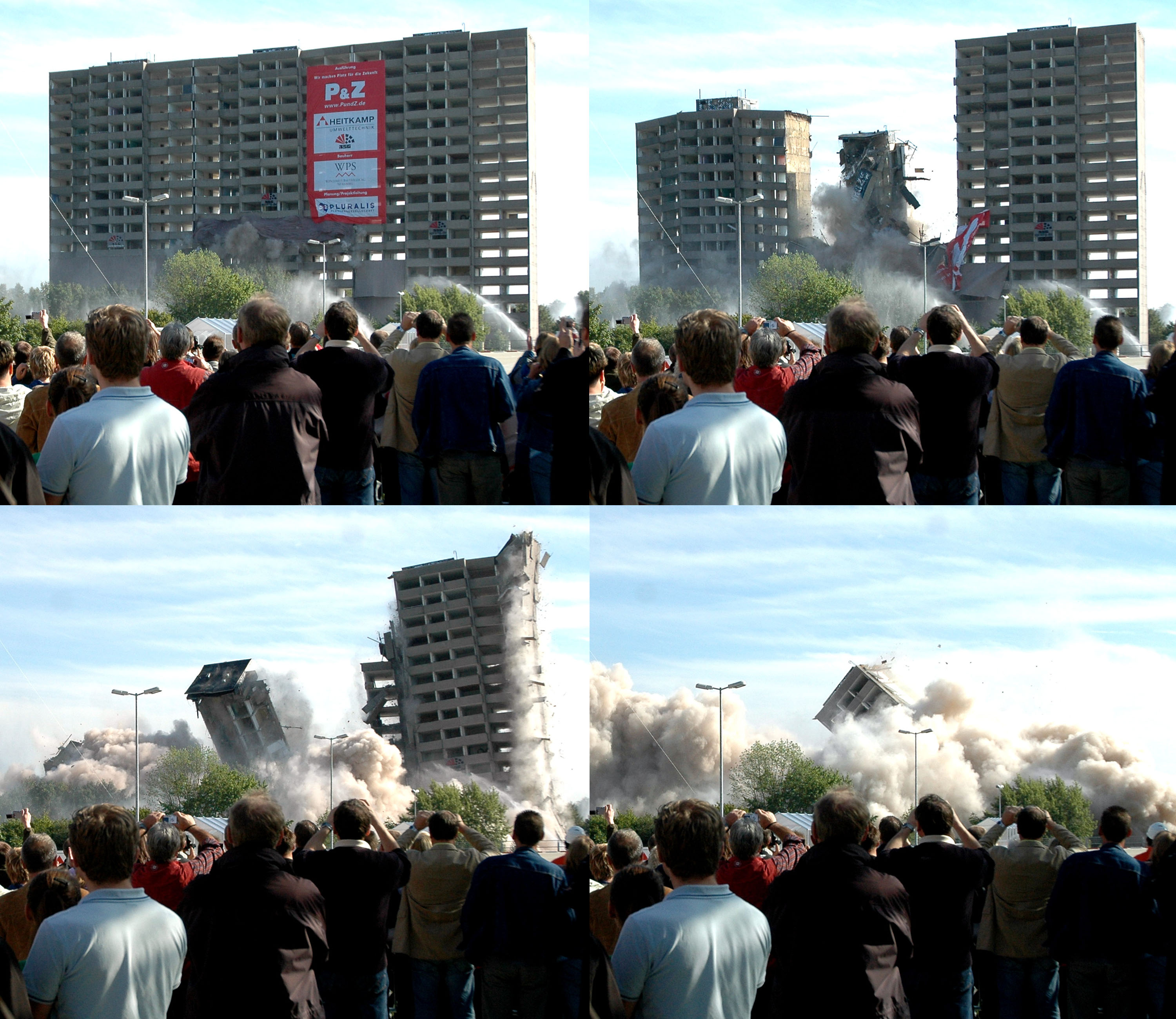 Sprengung des Hochhauskomplexes "Goliath" in Marl, Westfalen